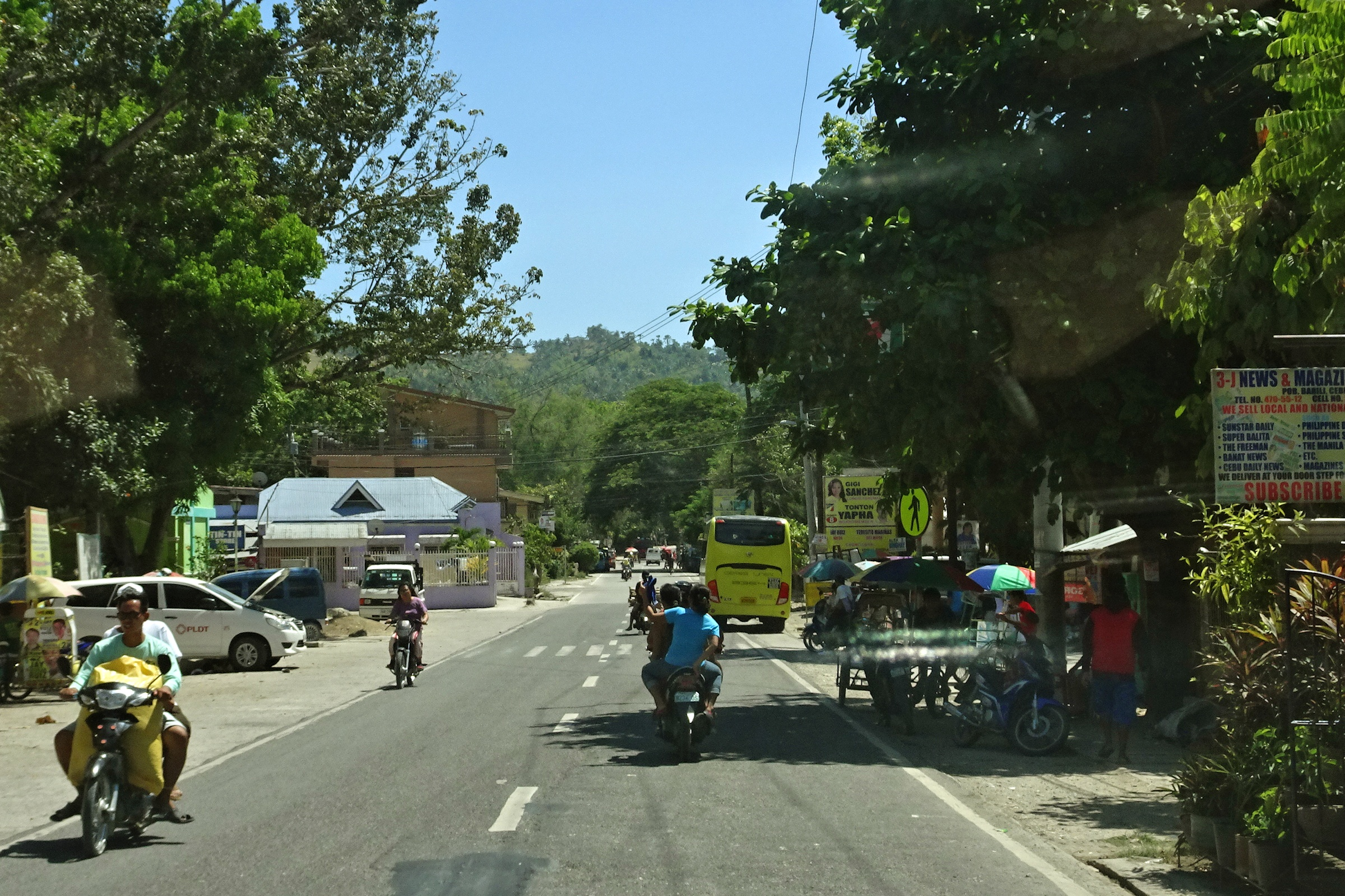 Barili, Cebu, Philippines